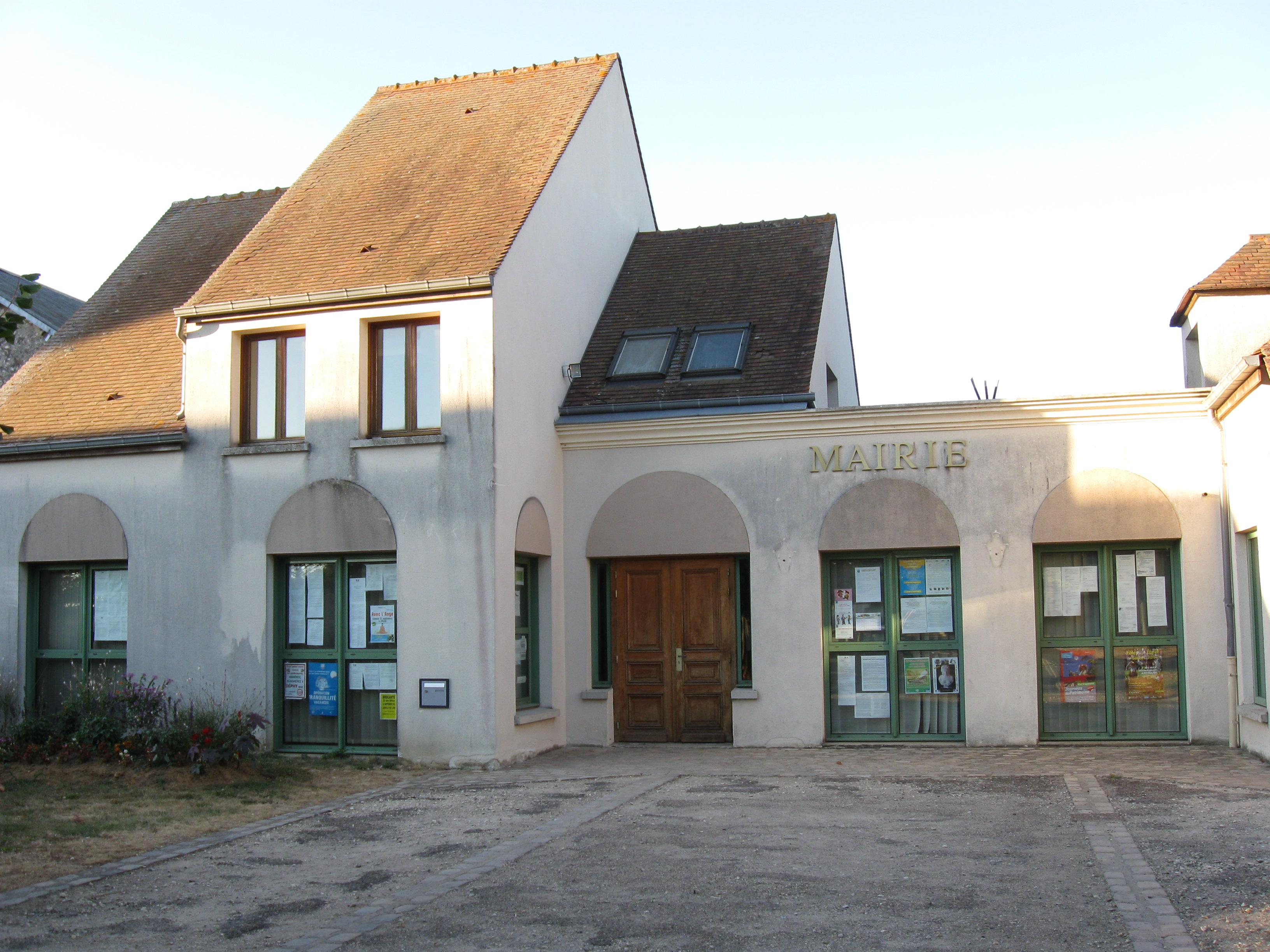 Mairie de Villeneuve-sur-Auvers. (département de l'Essonne, région Île-de-France).